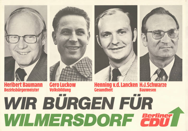 Heribert Baumann Bezirksbürgermeister Gero Luckow Volksbildung Henning v.d. Lancken Gesundheit H.-J. Schwarze Bauwesen Wir bürgen für Wilmersdorf Berliner CDUAbbildung:PorträtfotosPlakatart:Kandidaten-/Personenplakat mit PorträtObjekt-Signatur:10-004 : 458Bestand:Plakate zu Abgeordnetenhauswahlen Berlin (10-004)GliederungBestand10-18:Plakate zu Abgeordnetenhauswahlen Berlin (10-004) » CDULizenz:KAS/ACDP 10-004 : 458 CC-BY-SA 3.0 DE